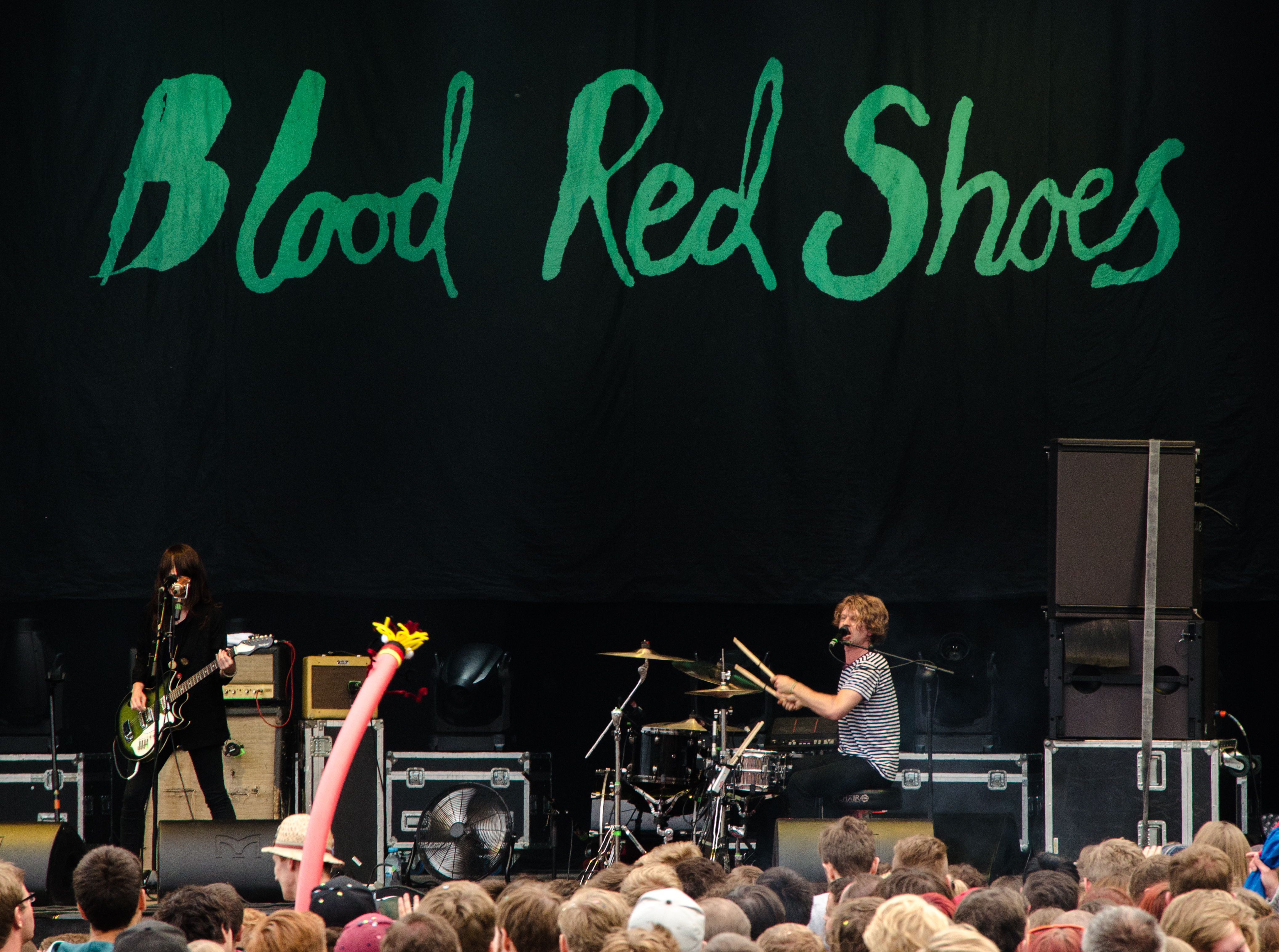 Die Band Blood Red Shoes auf dem Kosmonaut Festival 2014 in Chemnitz Oberrabenstein.